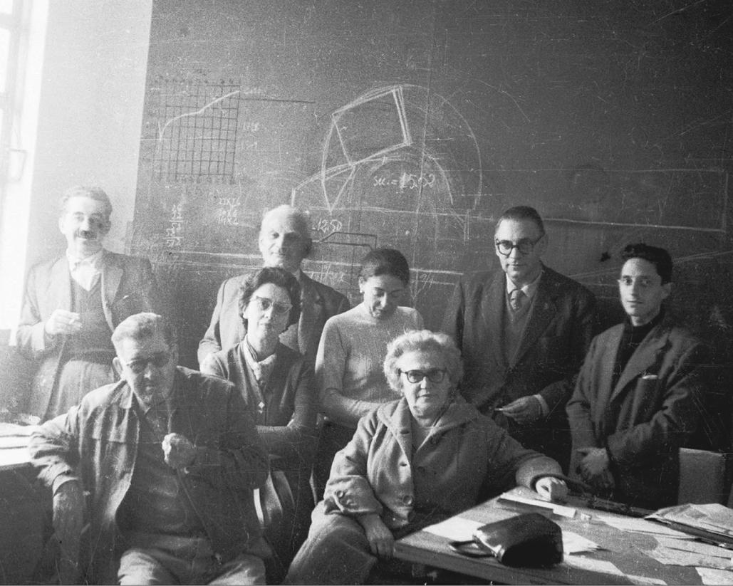 Luís Seoane e Isaac Díaz Pardo, á dereita da fotografía, con Xosé Núñez Búa e esposa, Bernardo Sofovich e esposa e Simón e Aida Scheimberg, en Magdalena (Arxentina), no centro cerámico onde ambos os dous idearon o Laboratorio de Formas, 1962.